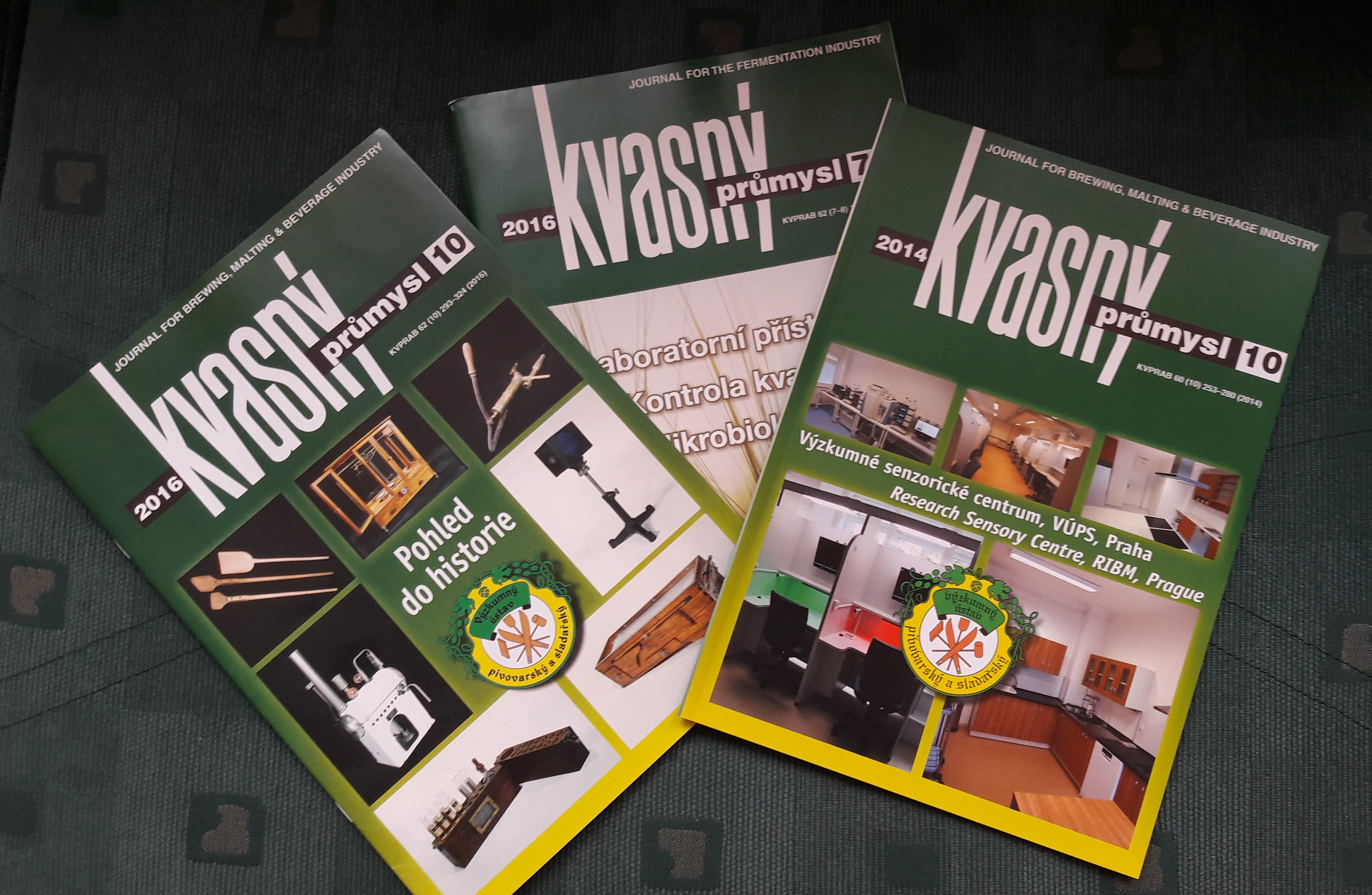 Obálky časopisu Kvasný průmysl